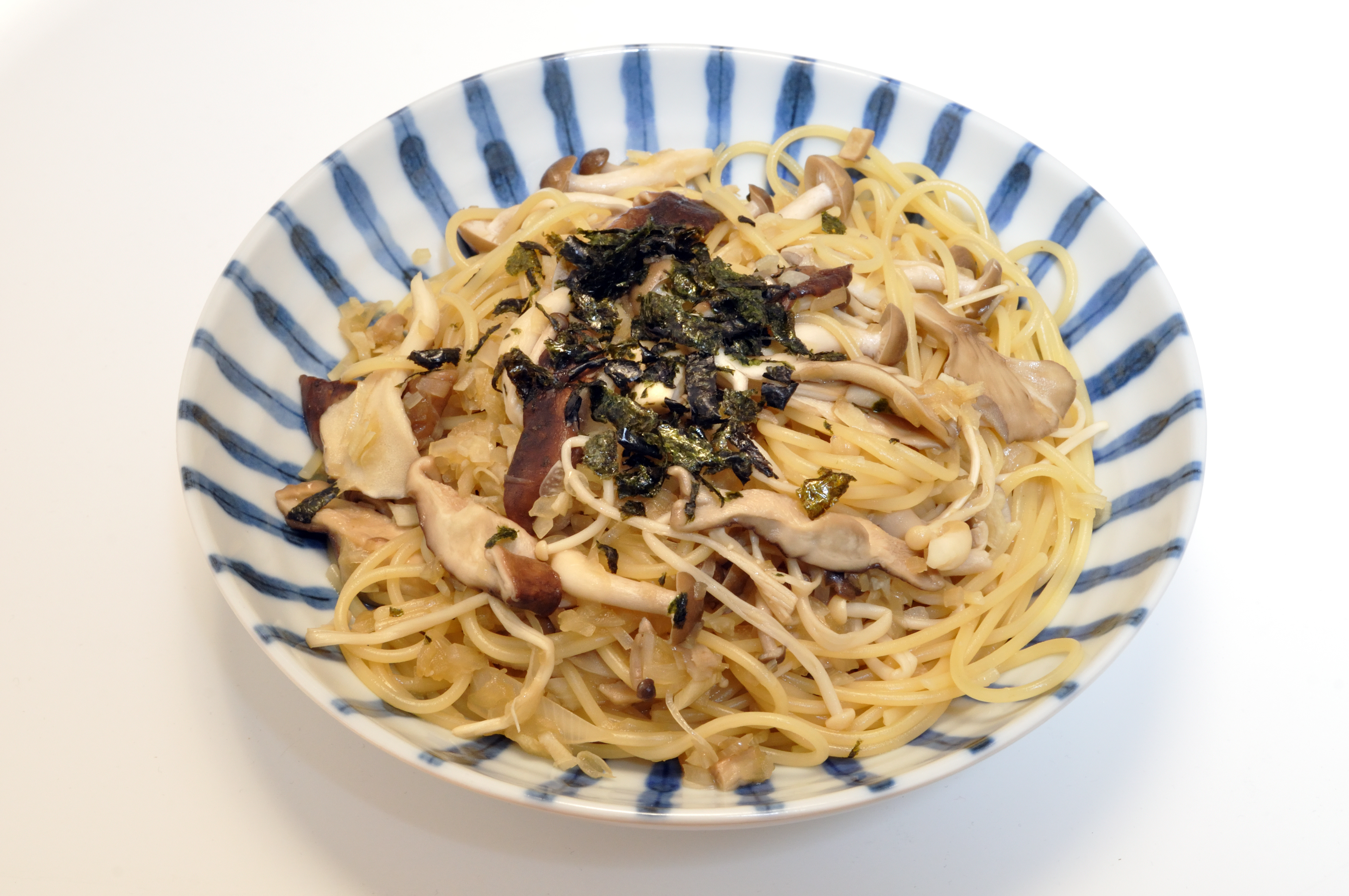 和風きのこスパゲッティの参考画像